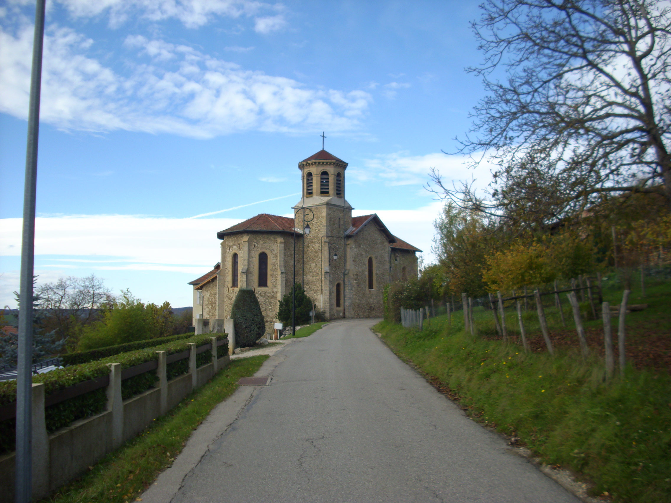 Eglise Saint-Martin (XIXe siècle) Architecte: Romiguière